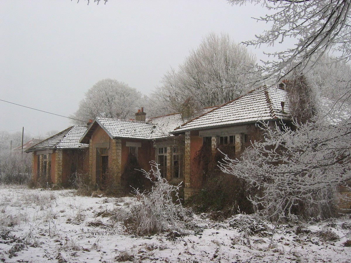 Camp d'Angevillers - Janvier 2006 Auteur : Michel Teiten